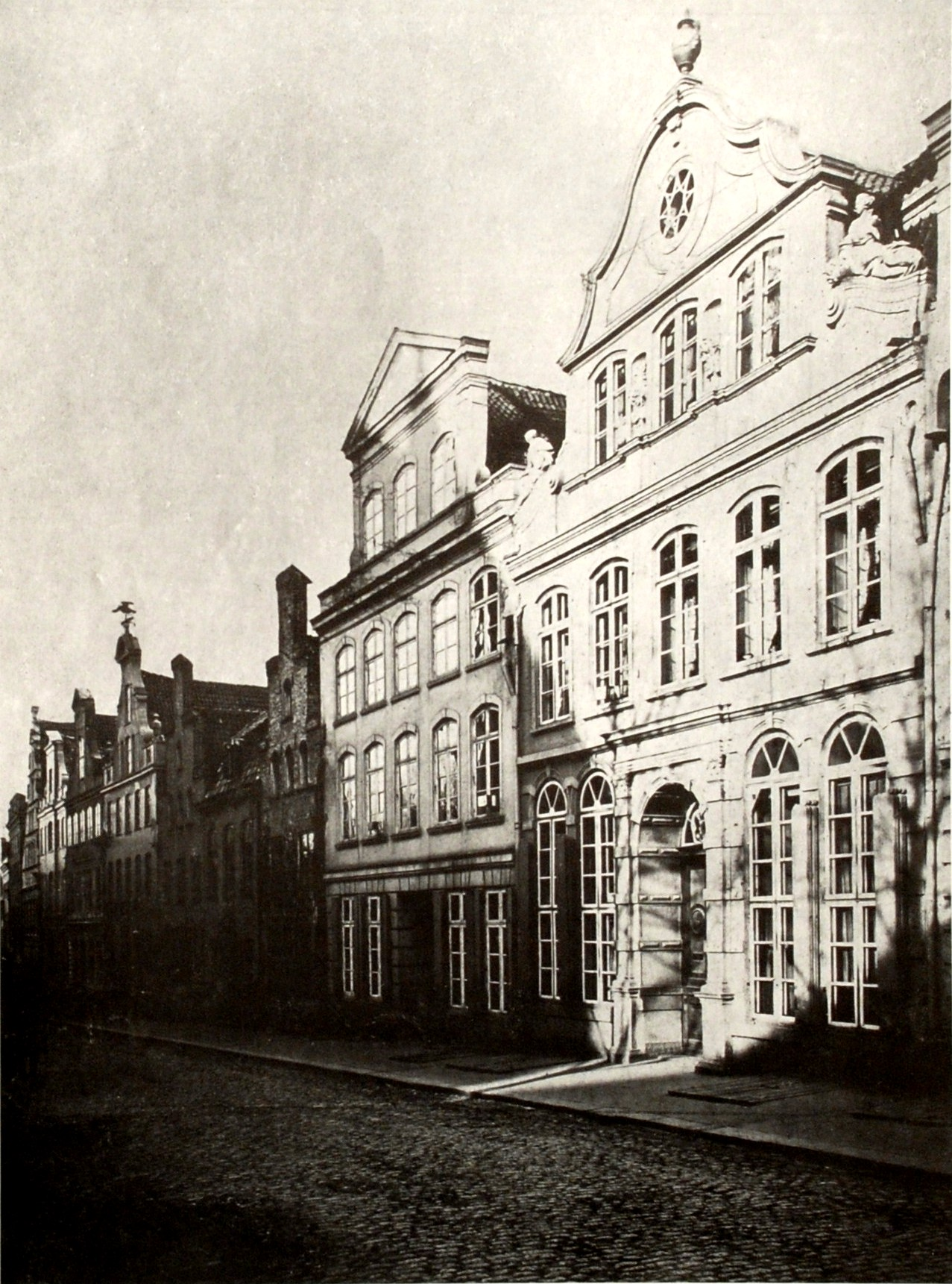 Älteste Fotografie (um 1870) des "Buddenbrook-Hauses" in der Lübecker Mengstraße. Es gehörte Thomas Manns Großmutter Elisabeth Mann. → [1]